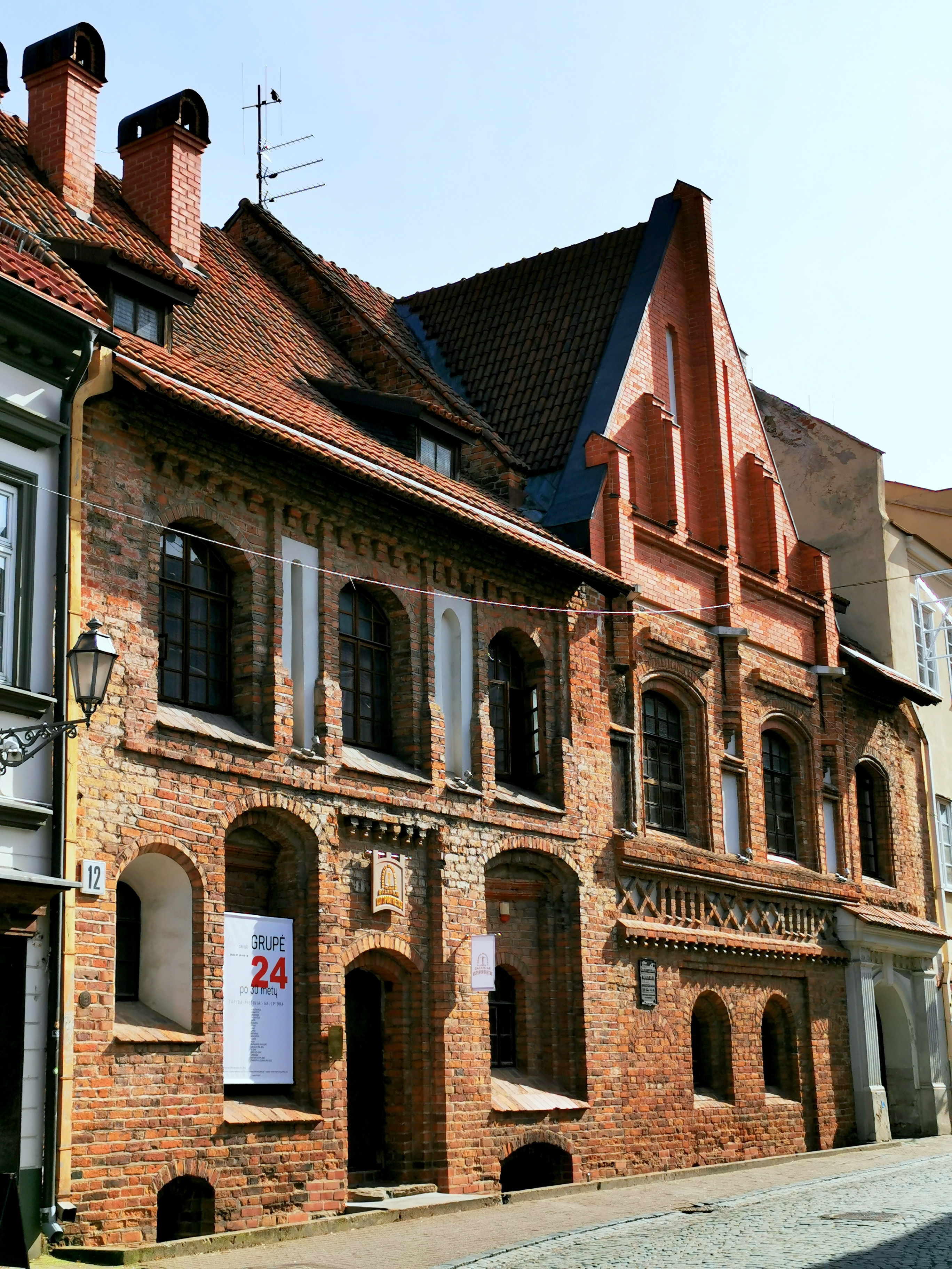 Pilies gatvė 12 namas